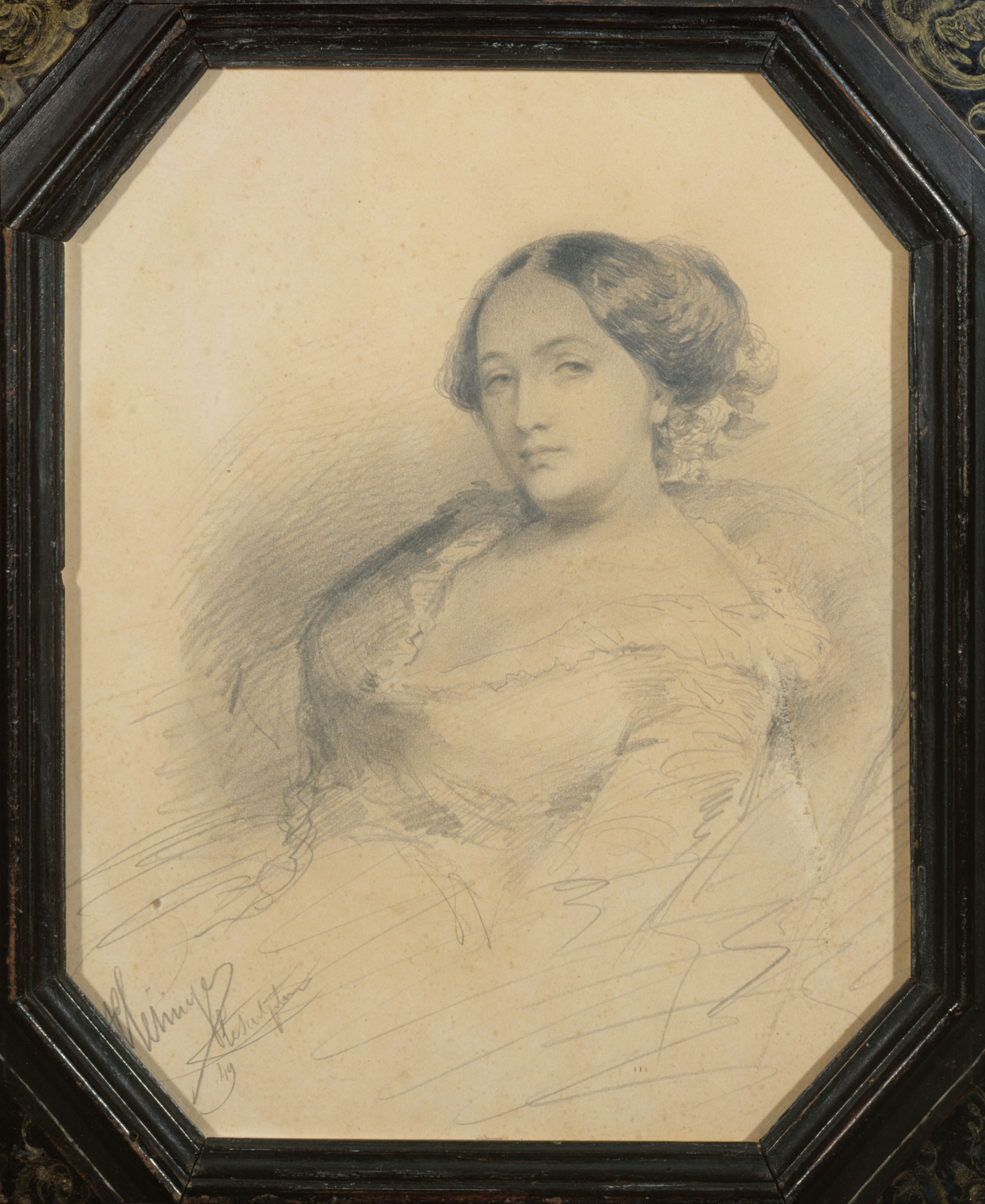 Le portrait est réalisé par son époux Auguste Clésinger, en 1849. Solange Dudevant est la fille de George Sand (1804-1876) et du baron Casimir Dudevant (1795-1871).